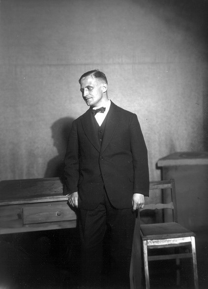 Porträt Franz Jung anläßlich der Uraufführung von dessen Schauspiel "Legende", Staatsschauspiel Dresden 13.10.1927. Aufnahme im Bühnenbild "Wohnküche Richter"